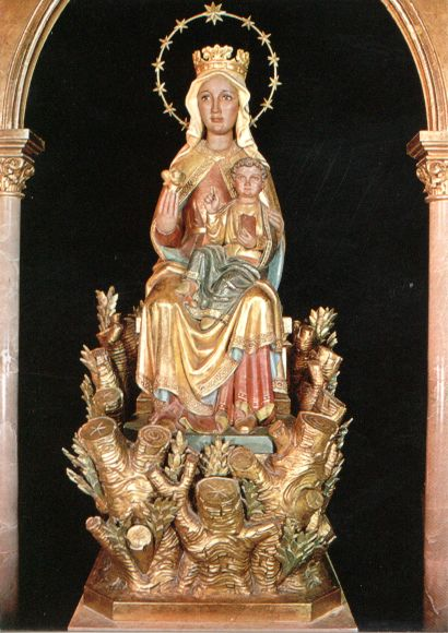 Nuestra Señora de la Estrella, San Asensio, Spain